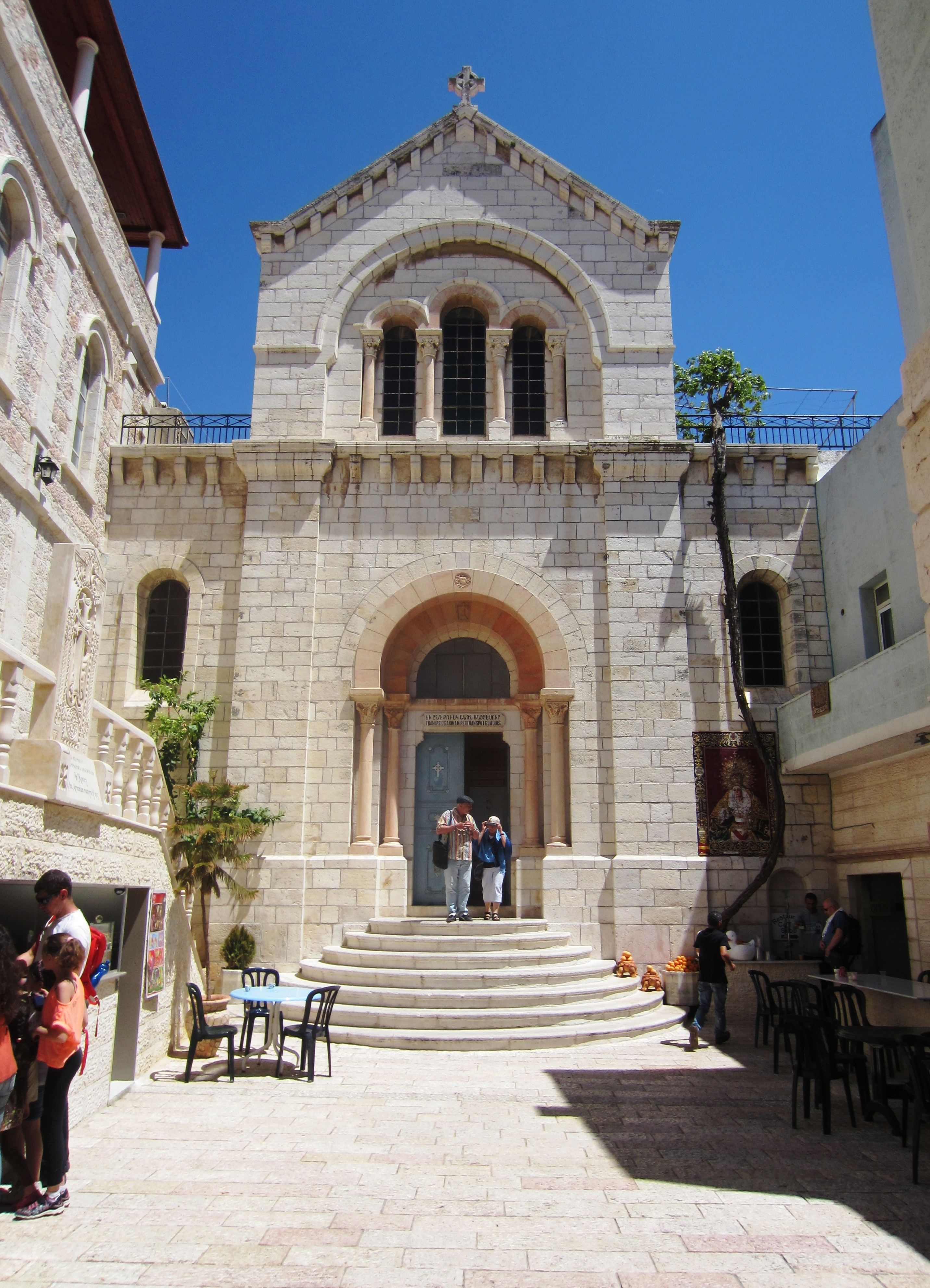 Die armenisch-katholische Kirche der Schmerzen Mariä unweit des Österreichischen Hospizes